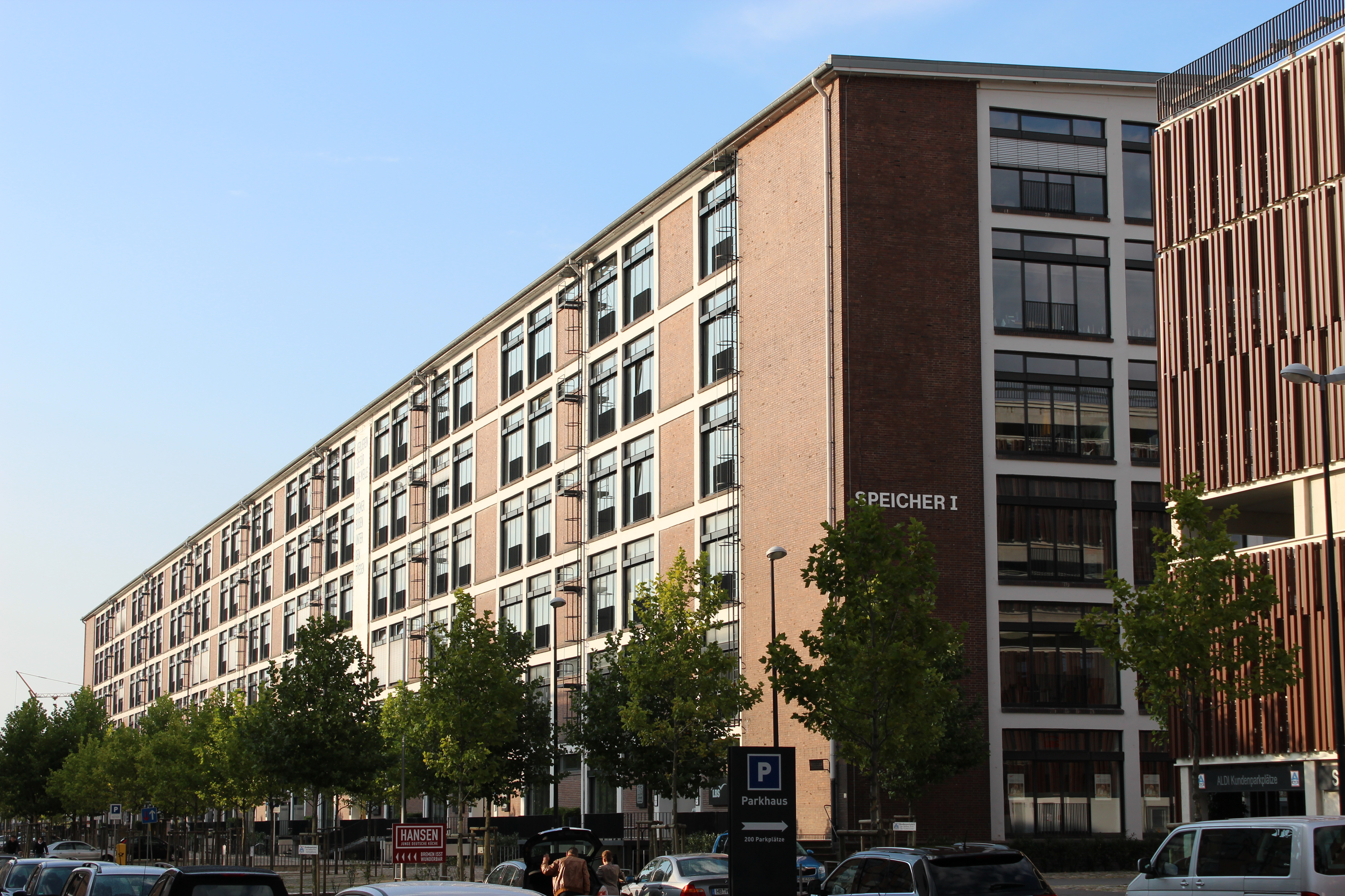 Speicher I in Bremen, Konsul-Smidt-Straße 8b, 8c, 8d, 8e, 8f, 8h, 8i, 8j.Das abgebildete Objekt ist ein geschütztes Kulturdenkmal in der Freien Hansestadt Bremen, mit der Nr. 1739 beim Landesamt für Denkmalpflege registriert.